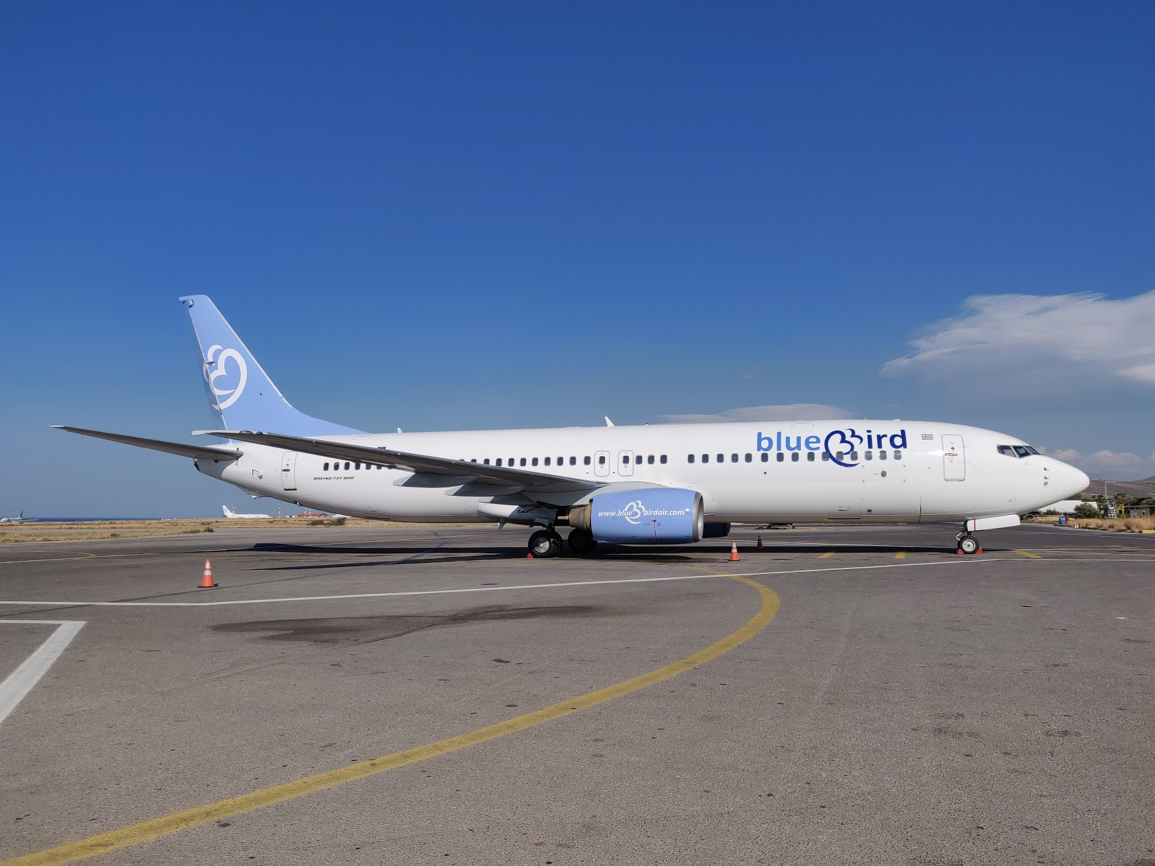 Bluebird Airways 9H-SHO 737-85F